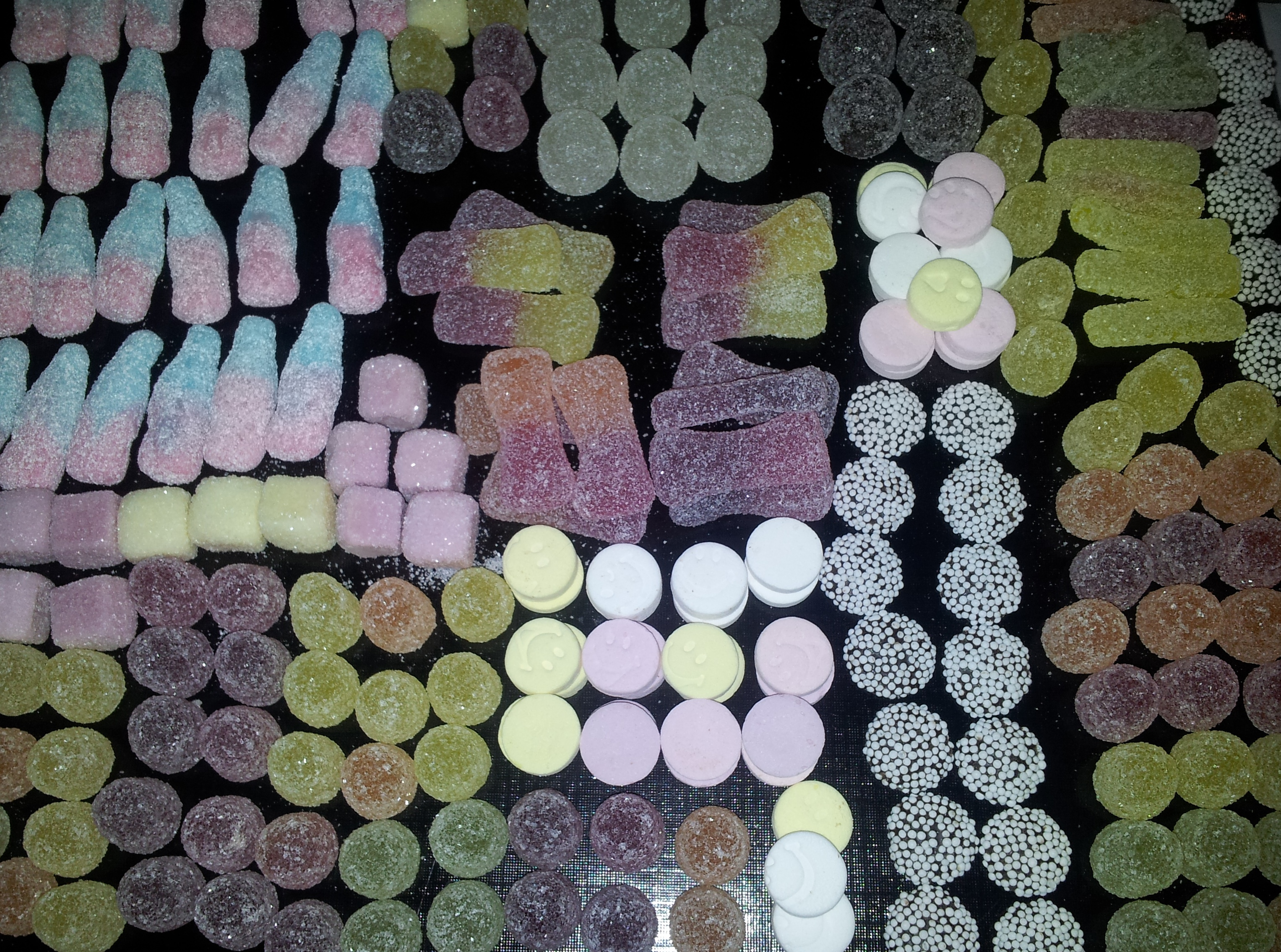 zakje tumtums gesorteerd op soorten